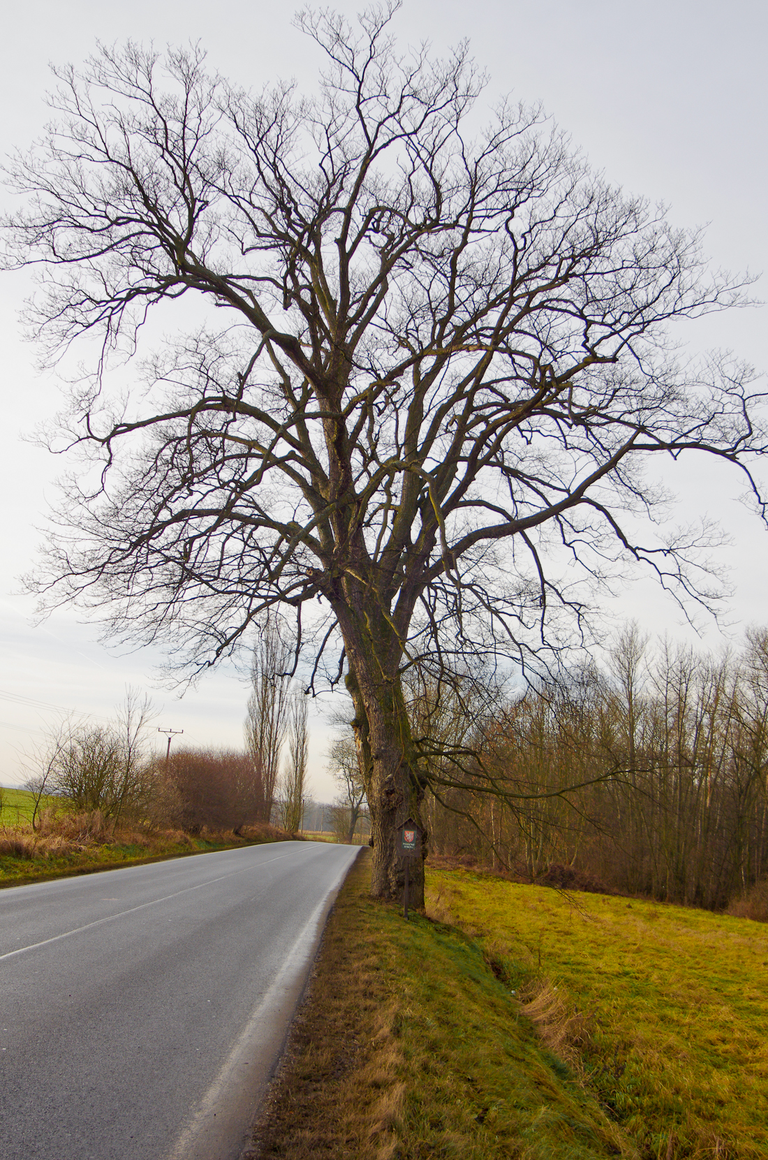 Sokolov, Památný strom Jilm pod Starou Ovčárnou, solitérní strom, nízký, válcovitý kmen, široká a hustá koruna tvořena třemi silnými kosterními větvemi, výška 20 m, obvod kmene 380 cm (údaje z roku 2008)